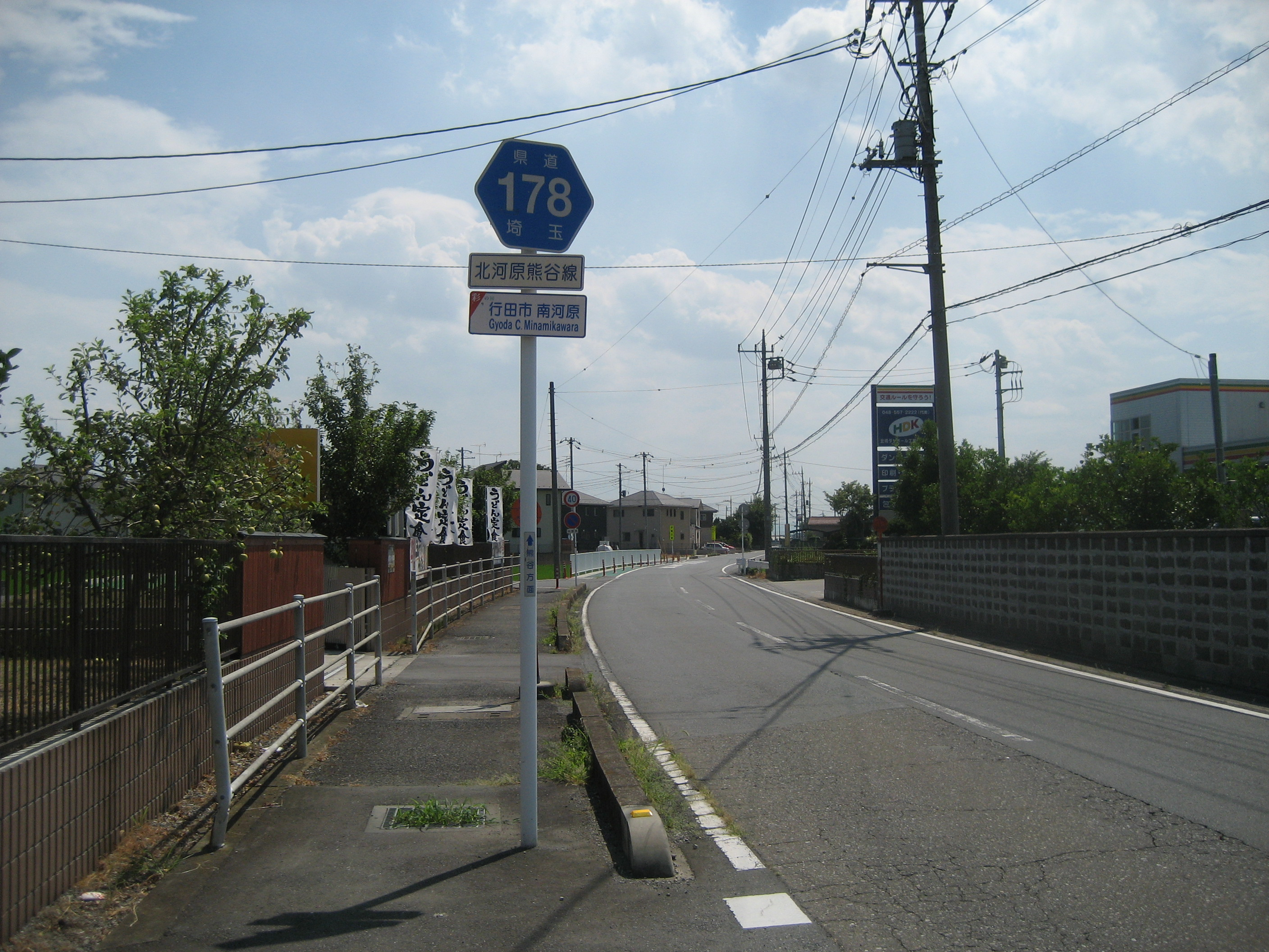 埼玉県道178号線行田市南河原